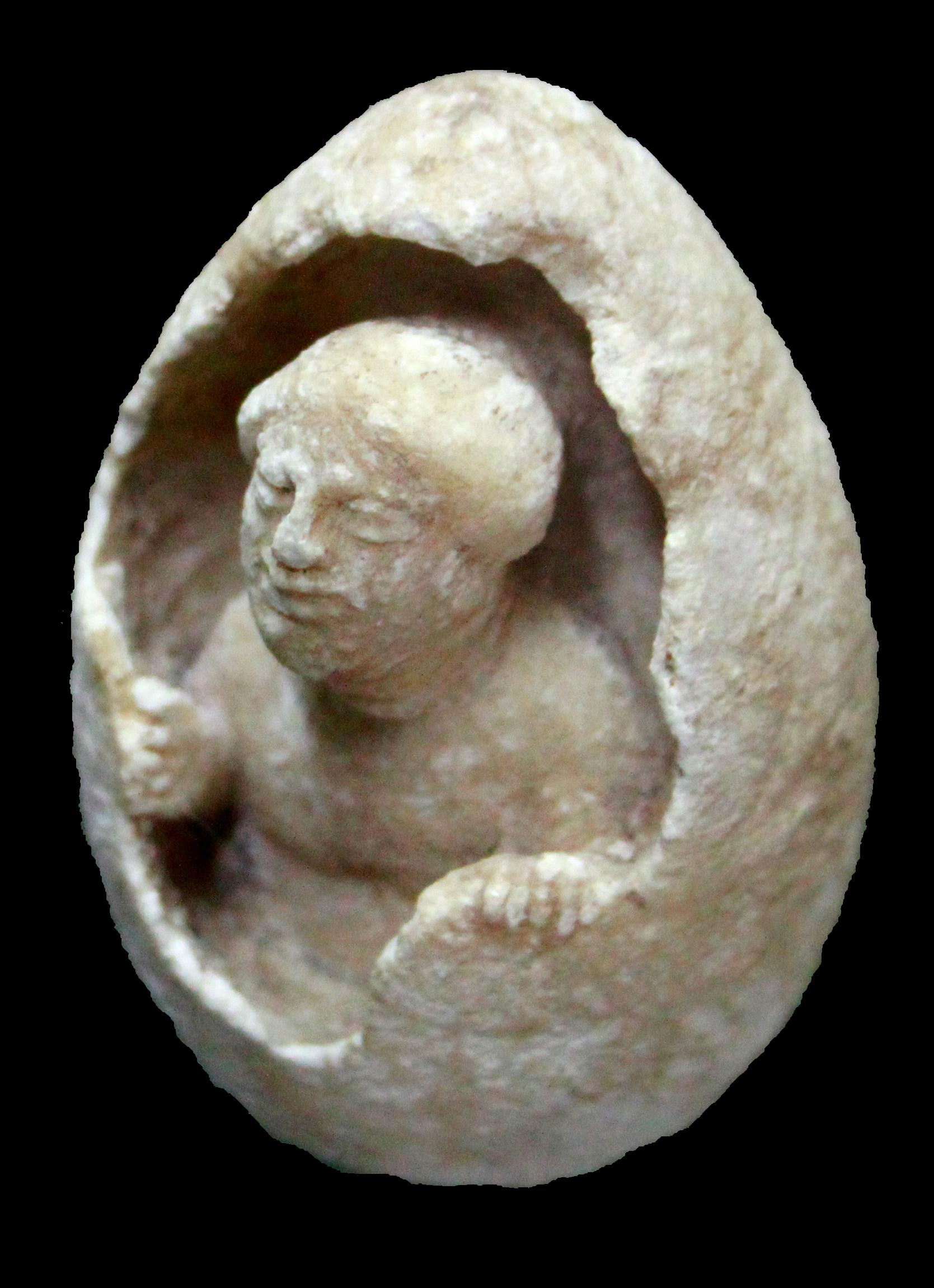 Elena, ekkolapsis (ἐκκόλαψις) la schiusa dell'uovo, Museo archeologico nazionale di Metaponto. In calcare, V sec. a.C.